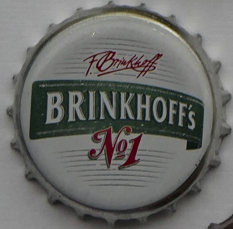 Ein Kronkorken der Brauerei Brinkhoff GmbH, Brinkhoff's No1, von 2019.